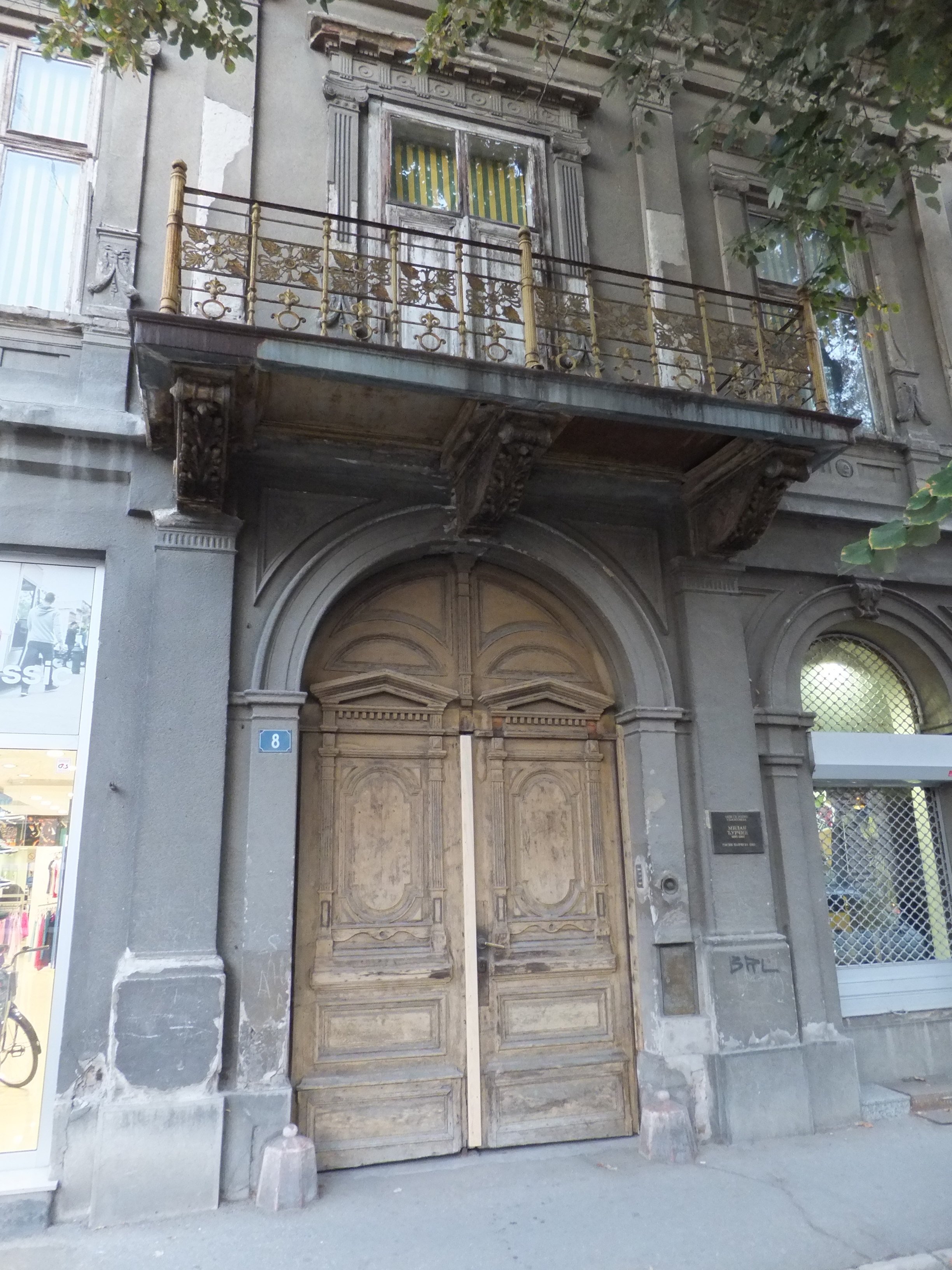 Кућа у Ул. Петра Драпшина бр. 8